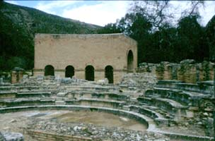 Odeion von Gortyn